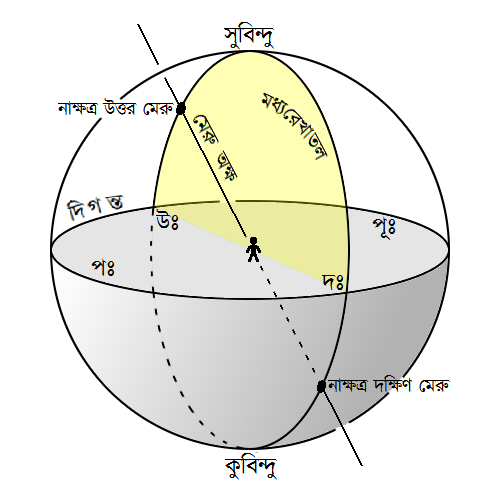 খগোলকে মধ্যরেখাতলের অবস্থান হলুদ দিয়ে দেখানো হয়েছে। ধ্রুবতারার অবস্থানে নাক্ষত্র উত্তর মেরু কল্পনা করা হয়।